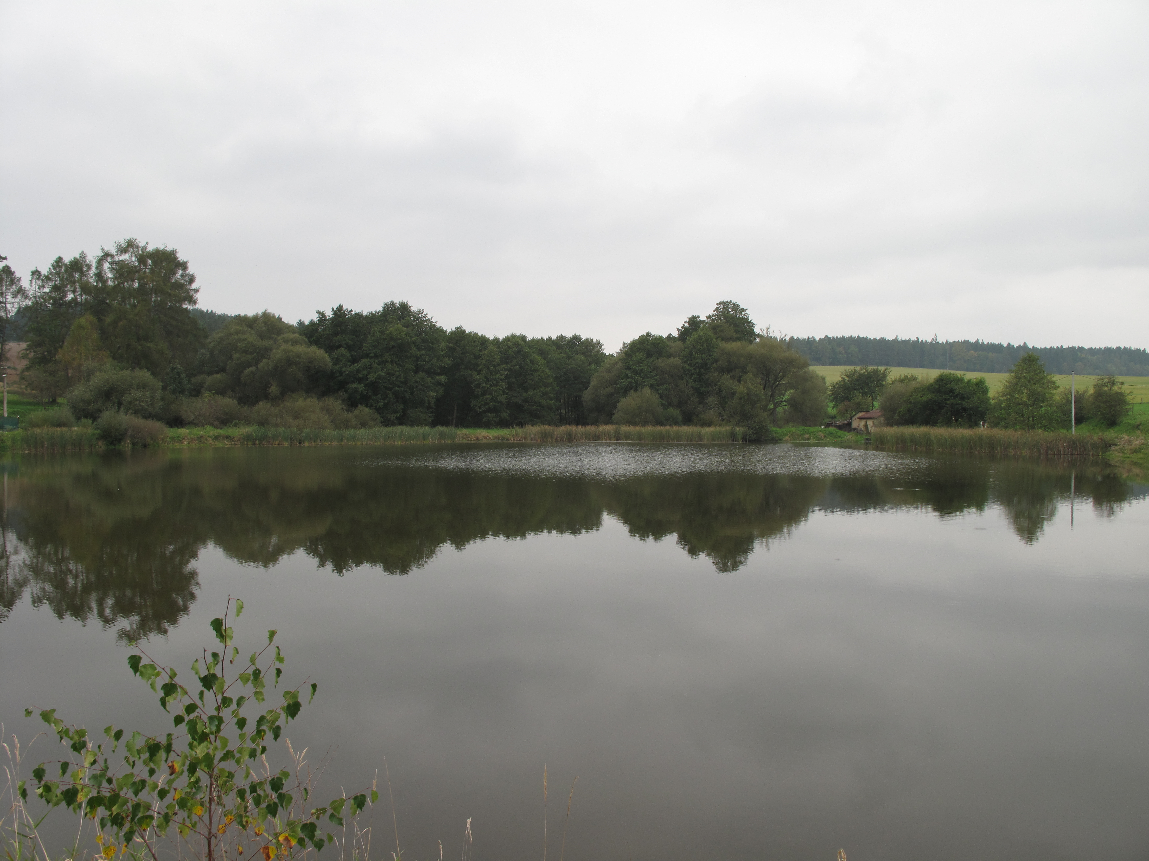 Rybník ve Vestci. Okres Benešov, Česká republika.